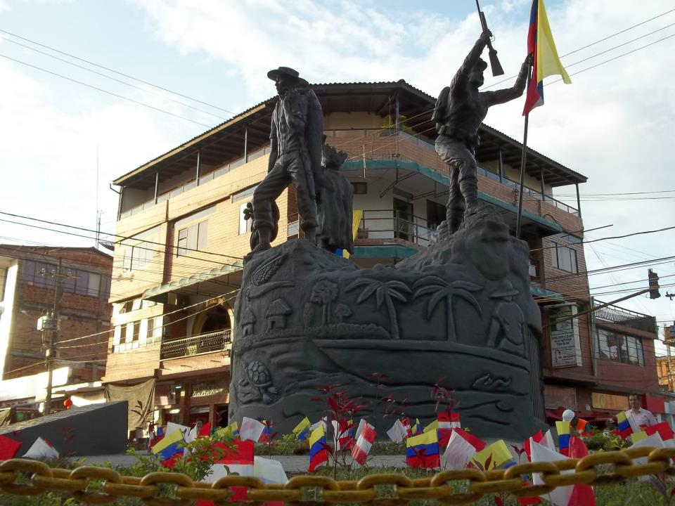 Monumento al Centenario, Puerto Asís - 2012